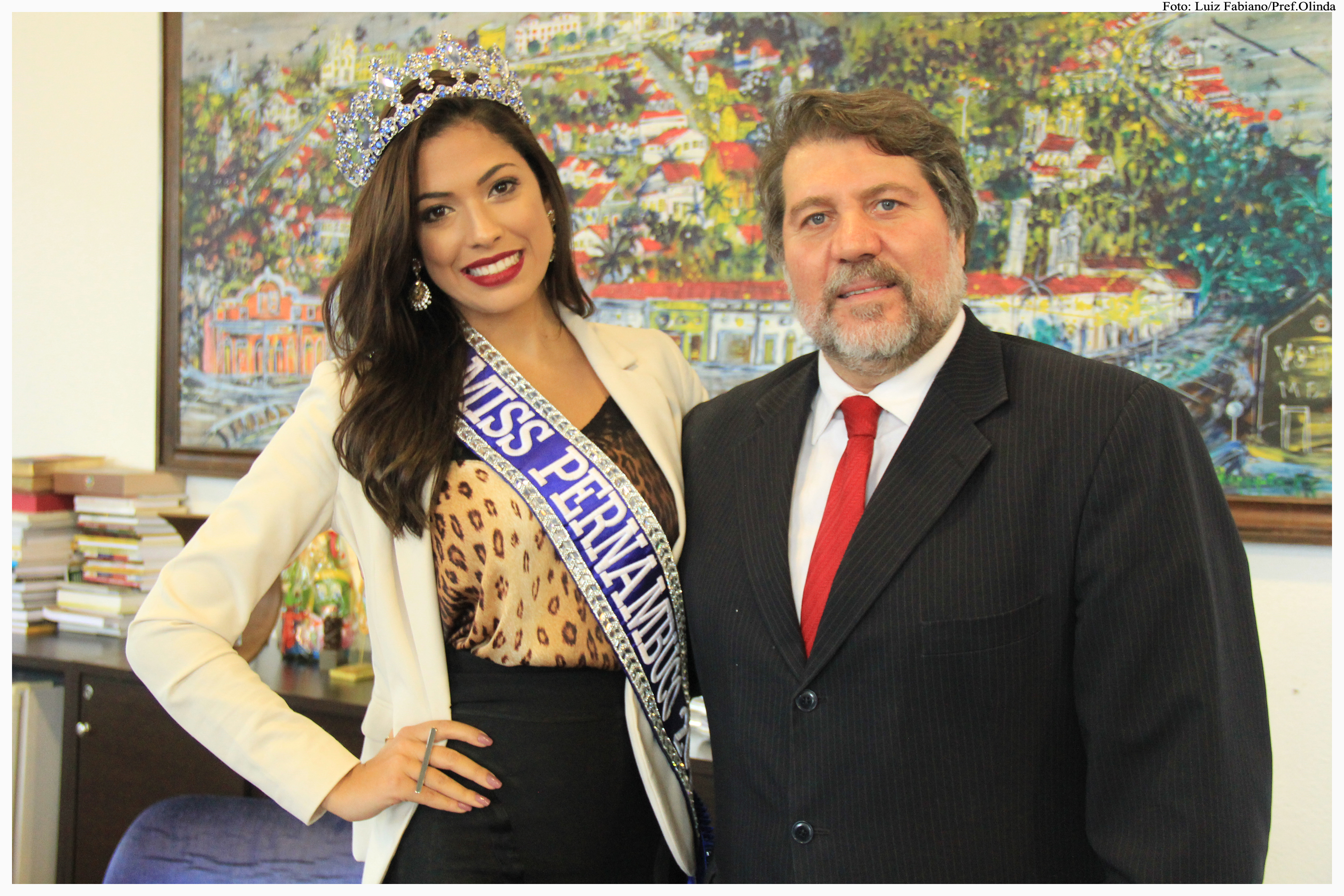 Foto: Luiz Fabiano/Pref.Olinda